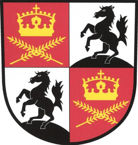 Černilov znak